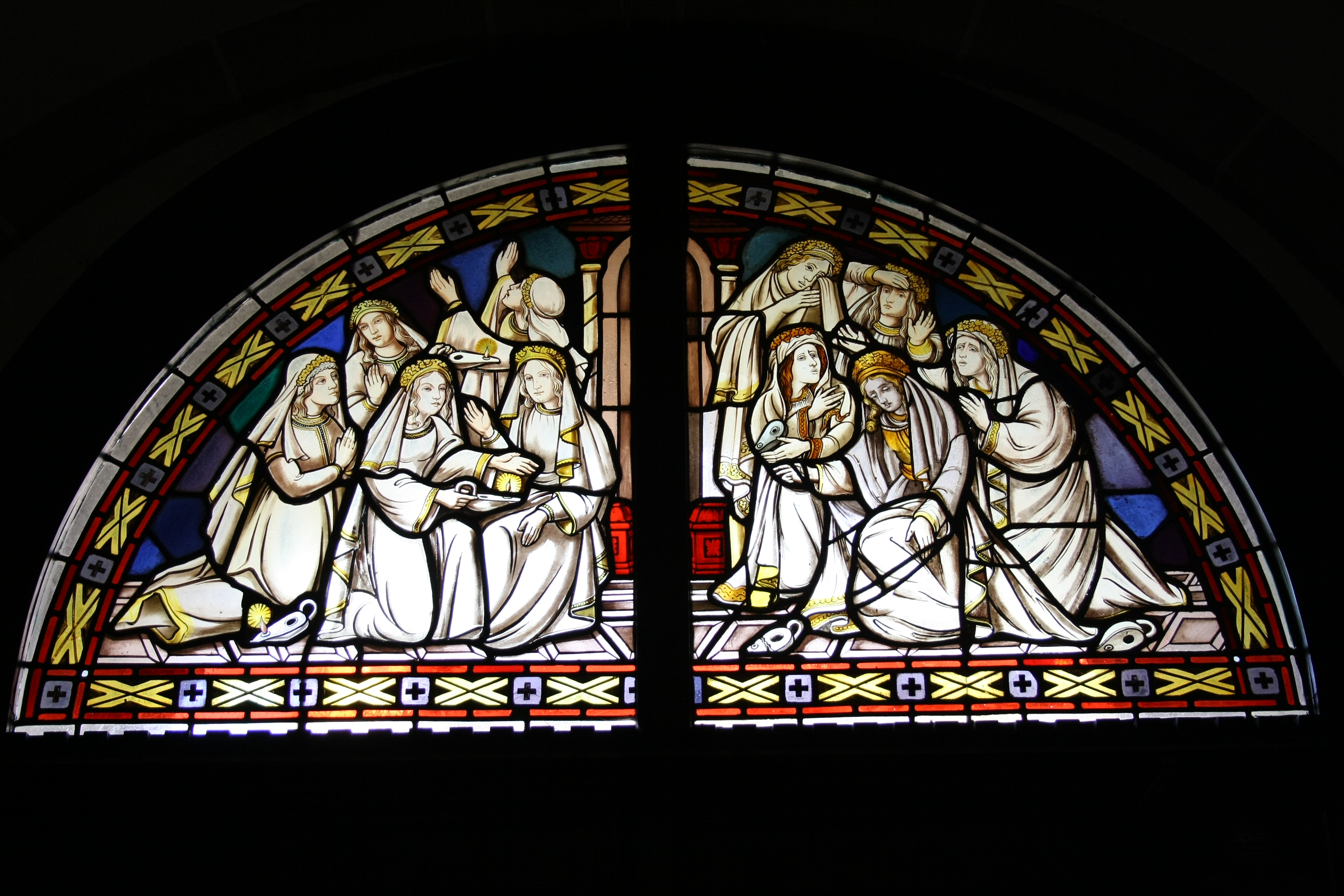 Bleiglasfenster in der katholischen Pfarrkirche St.Philippus und Jakobus in Kempenich, Darstellung: die klugen und die törichten Jungfrauen, Hersteller: Glasmalerei Oidtmann (lt. Firmenarchiv)